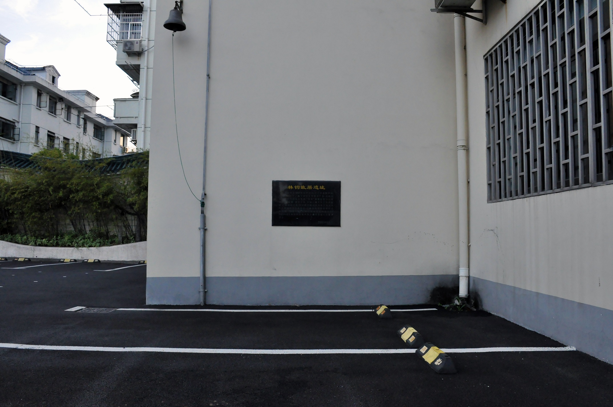 中文（中国大陆）: 林钧故居遗址 川沙新镇新川路观澜小学内